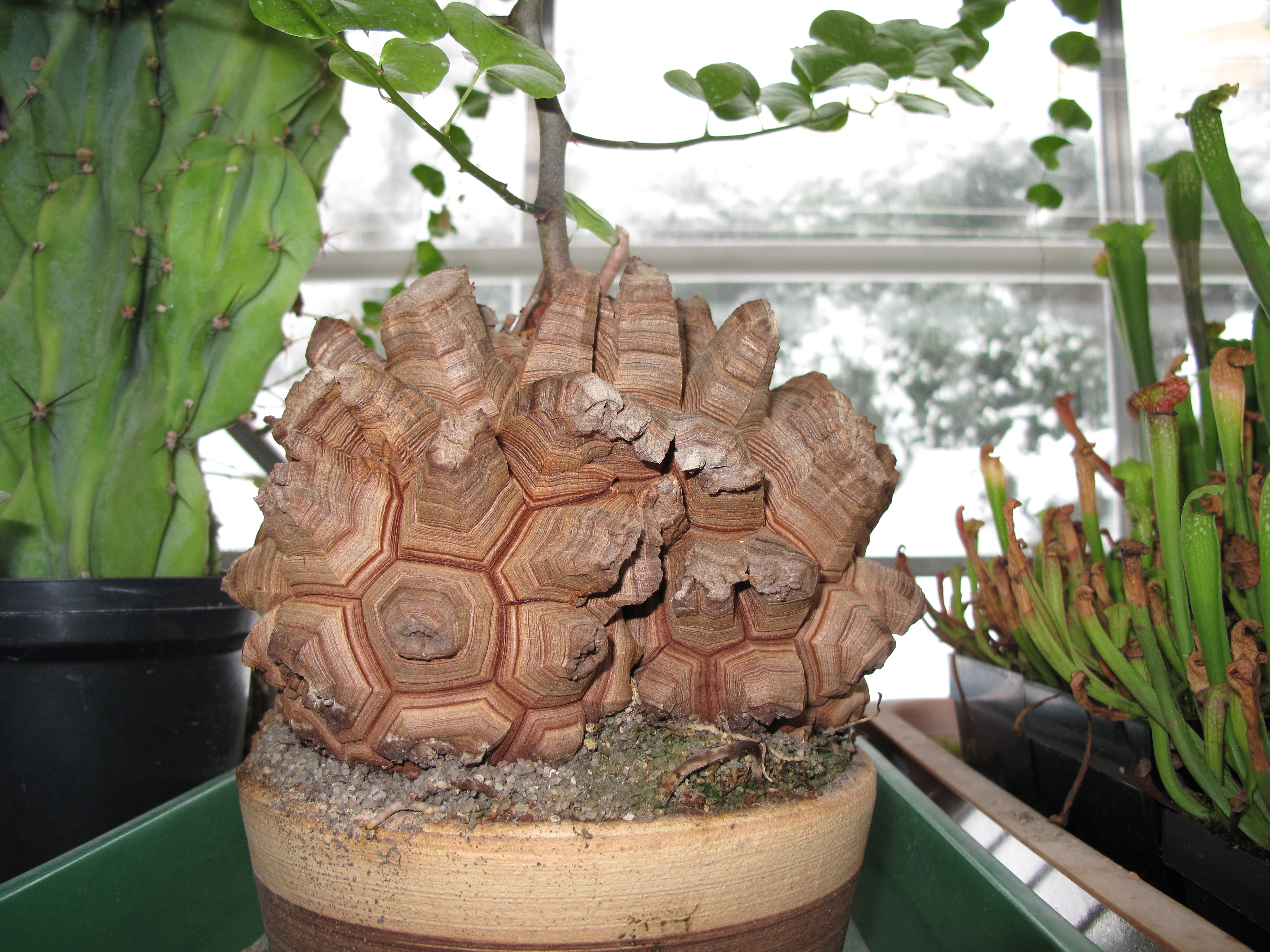 Unidentified plant.